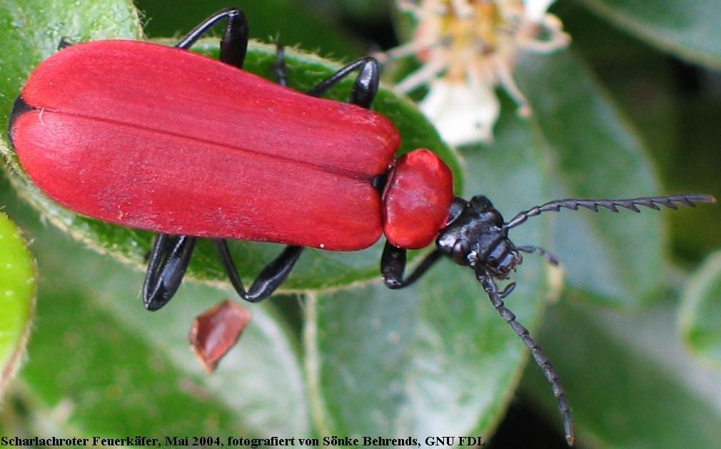 Scharlachroter Feuerkäfer (Pyrochroa coccinea). Das Foto entstand auf der Rückfahrt aus meinem Pfingsturlaub von Eckernförde nach Hamburg. Bei einer meiner Pausen fiel mir das Tier in einer Friedhofshecke auf. Da sich das Tier gerade putzte, blieb mir reichlich Zeit für eine kleine Fotoserie. Auf diesem Bild ist gerade eines der Vorderbeine "dran". An den ab dem dritten Segment "gesägten" Fühler ist zu erkennen, dass es sich um einen weiblichen Käfer handelt. Die Fühler der männlichen Käfer sind "gekämmt".